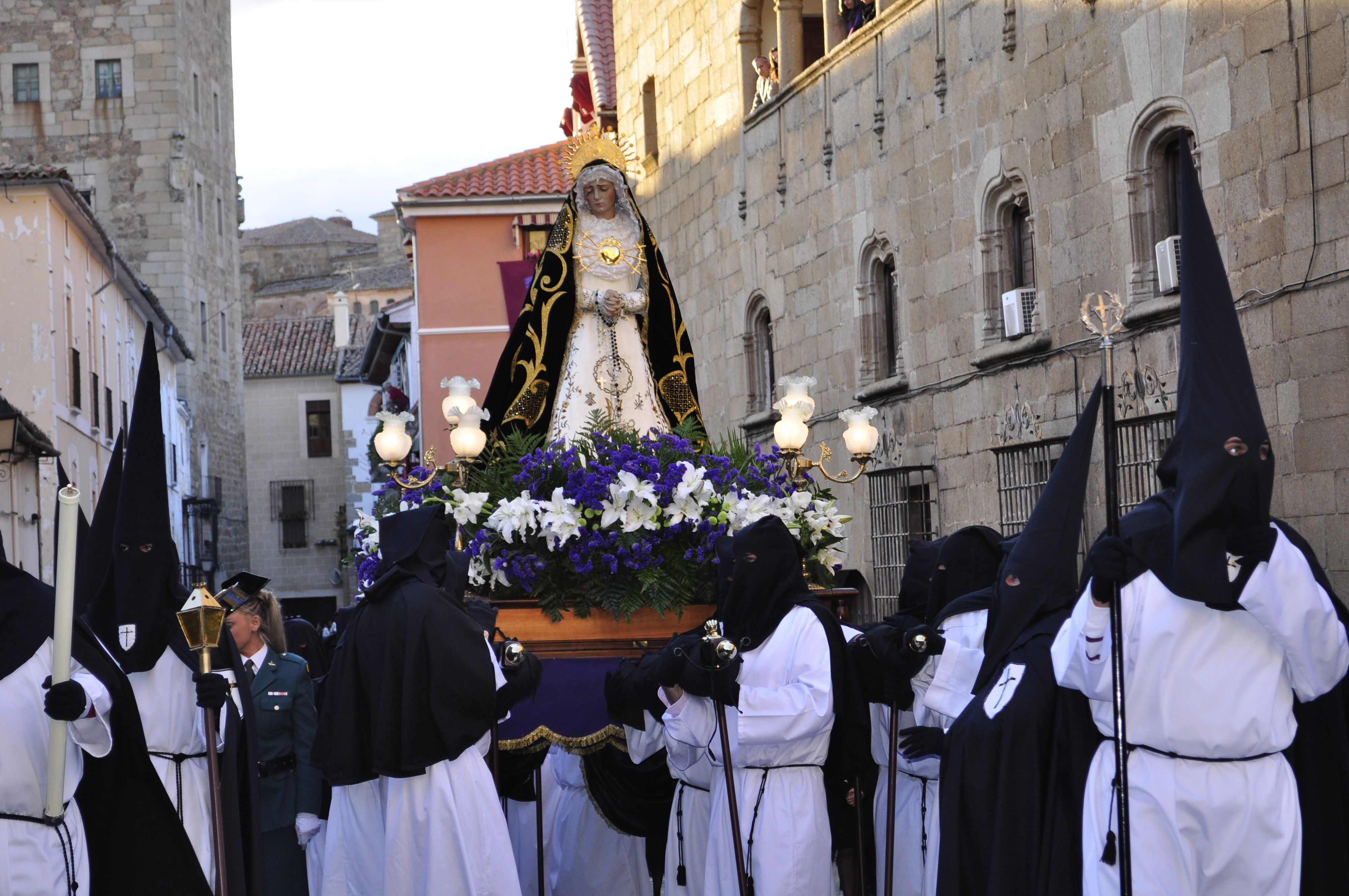 Cofradia de la Soledad y Santo Sepulcro. Hermano Mayor: Narciso Juanals Parroquia: Santo Domingo Año de Fundación: Comienzos del Siglo XV Hermano Mayor: Narciso Juanals Hora de salida: 19,30 horas Pasos:Nuestra Señora de la Soledad, Santo Sepulcro, San Juan María Magdalena y San Pedro Acompañamiento musical: La banda de música de la OJE de Plasencia Número de hermanos de la cofradía: 700 (